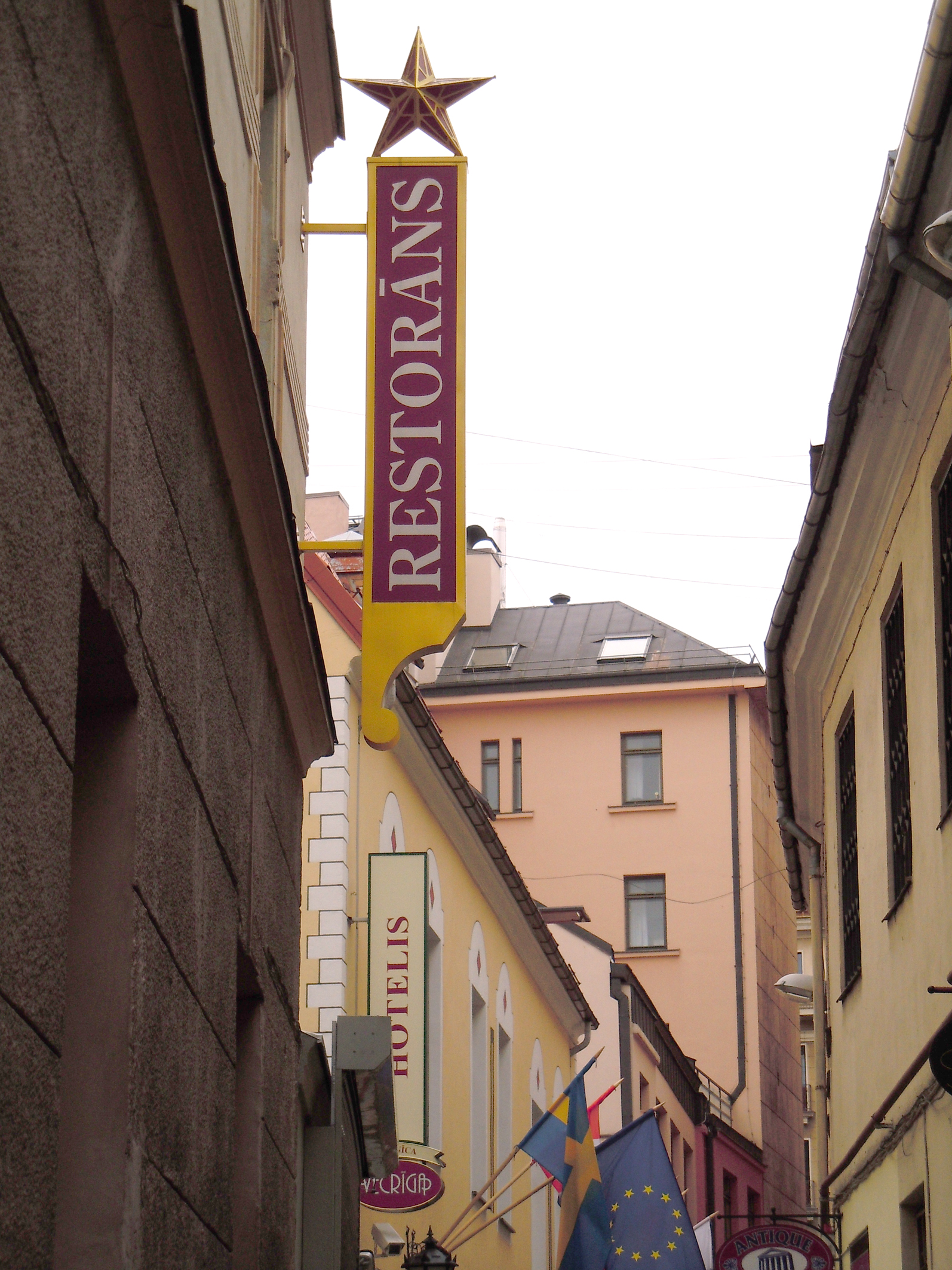 Restorāns Vecrīgā.